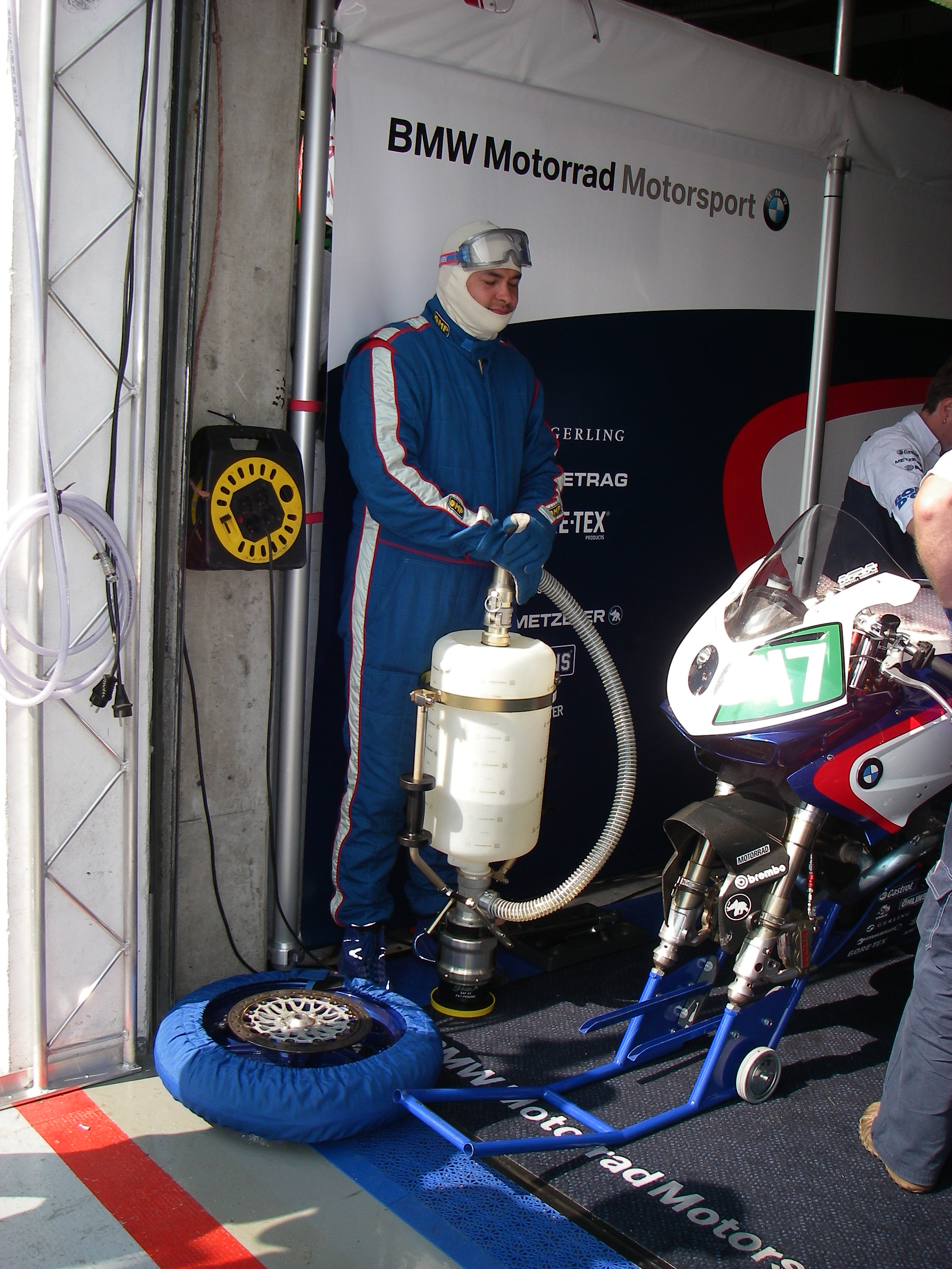 BMW Motorrad Motorsport Endurance Tanker